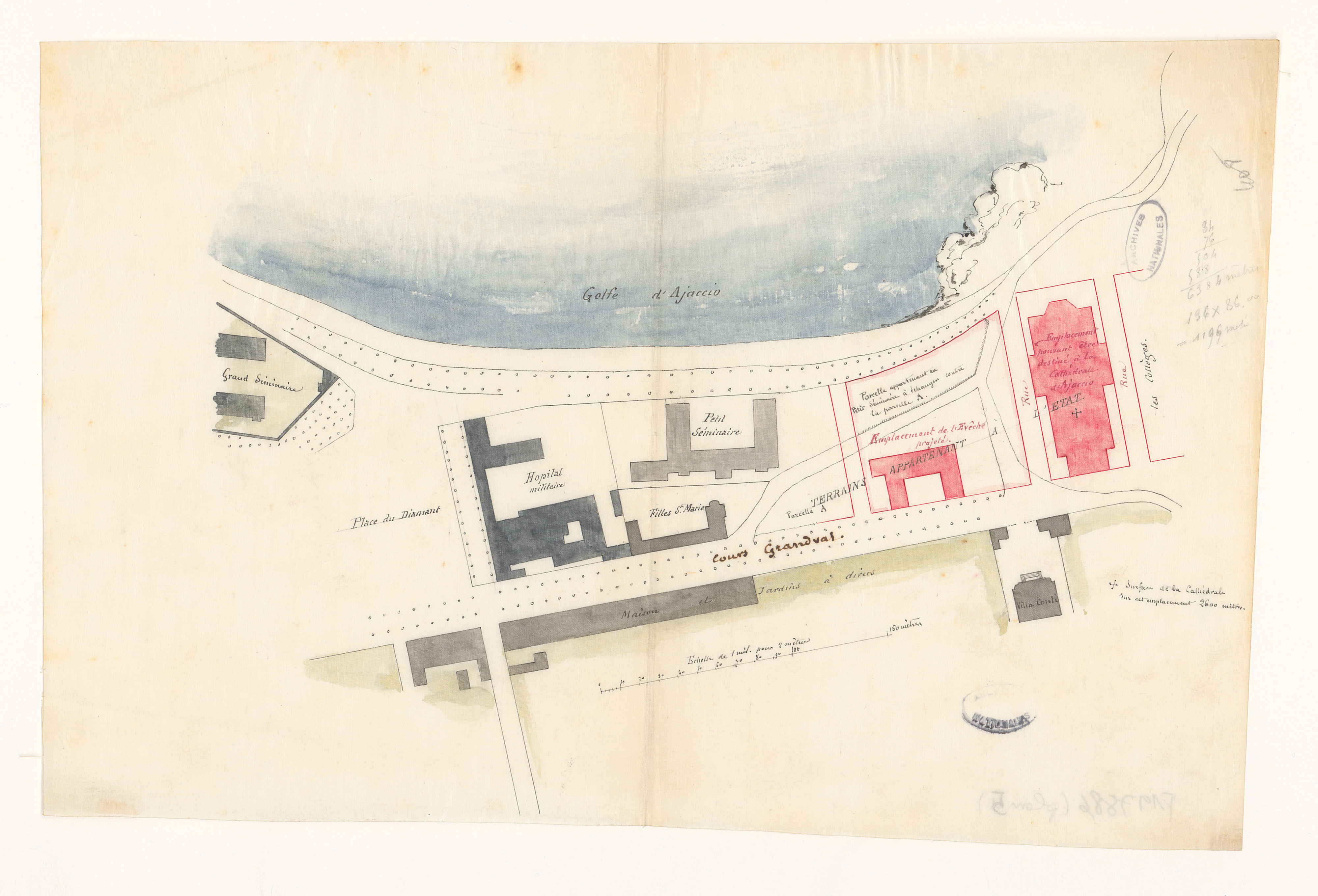 Plan de situation pour l'emplacement de la nouvelle cathédrale. Plan issu des dossiers de travaux de restauration des cathédrales (1802-1912), conservés aux Archives nationales (inventaire et autres documents numérisés consultables en ligne).